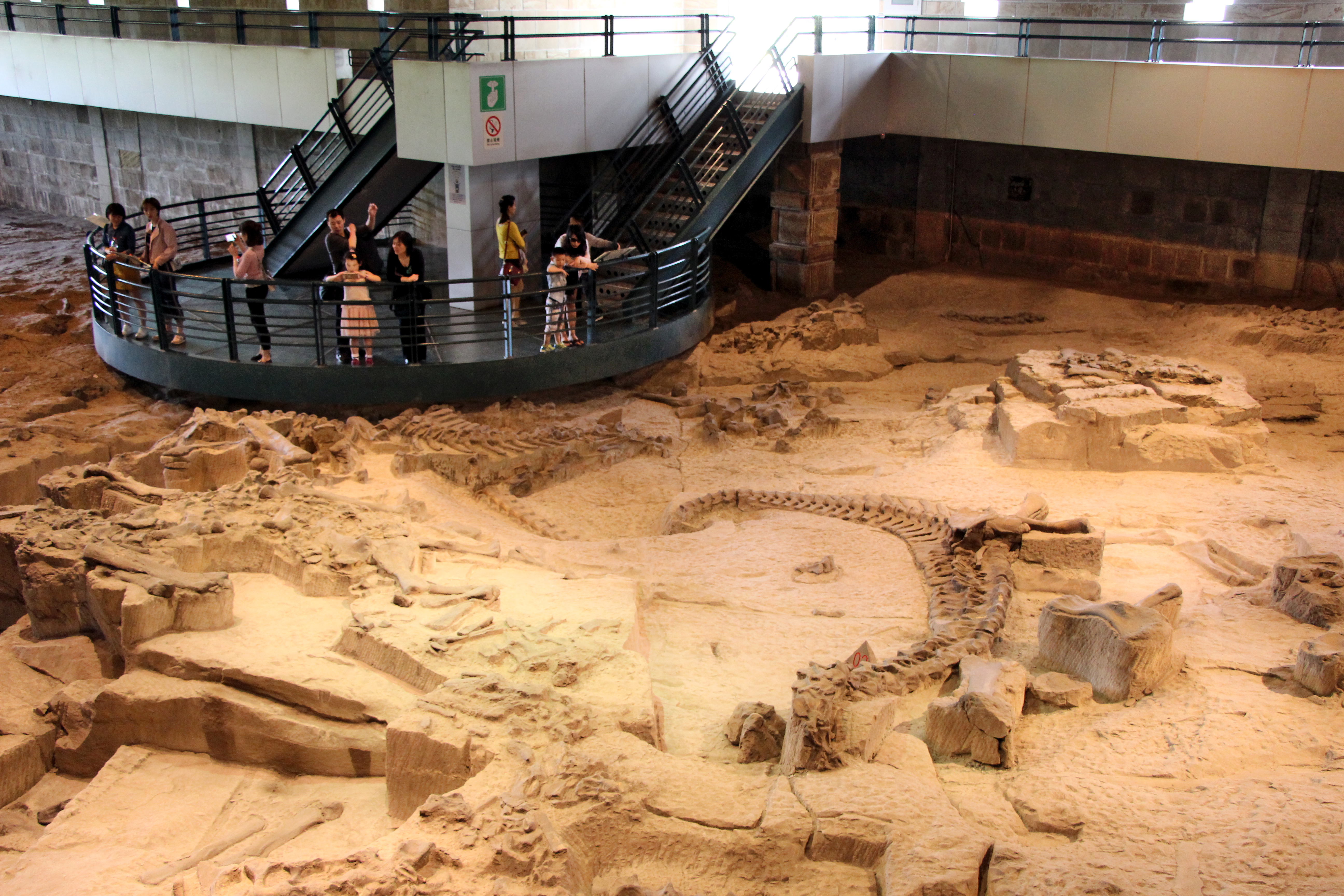 Musée de site construit directement sur le gisement fossilifère exceptionnel.